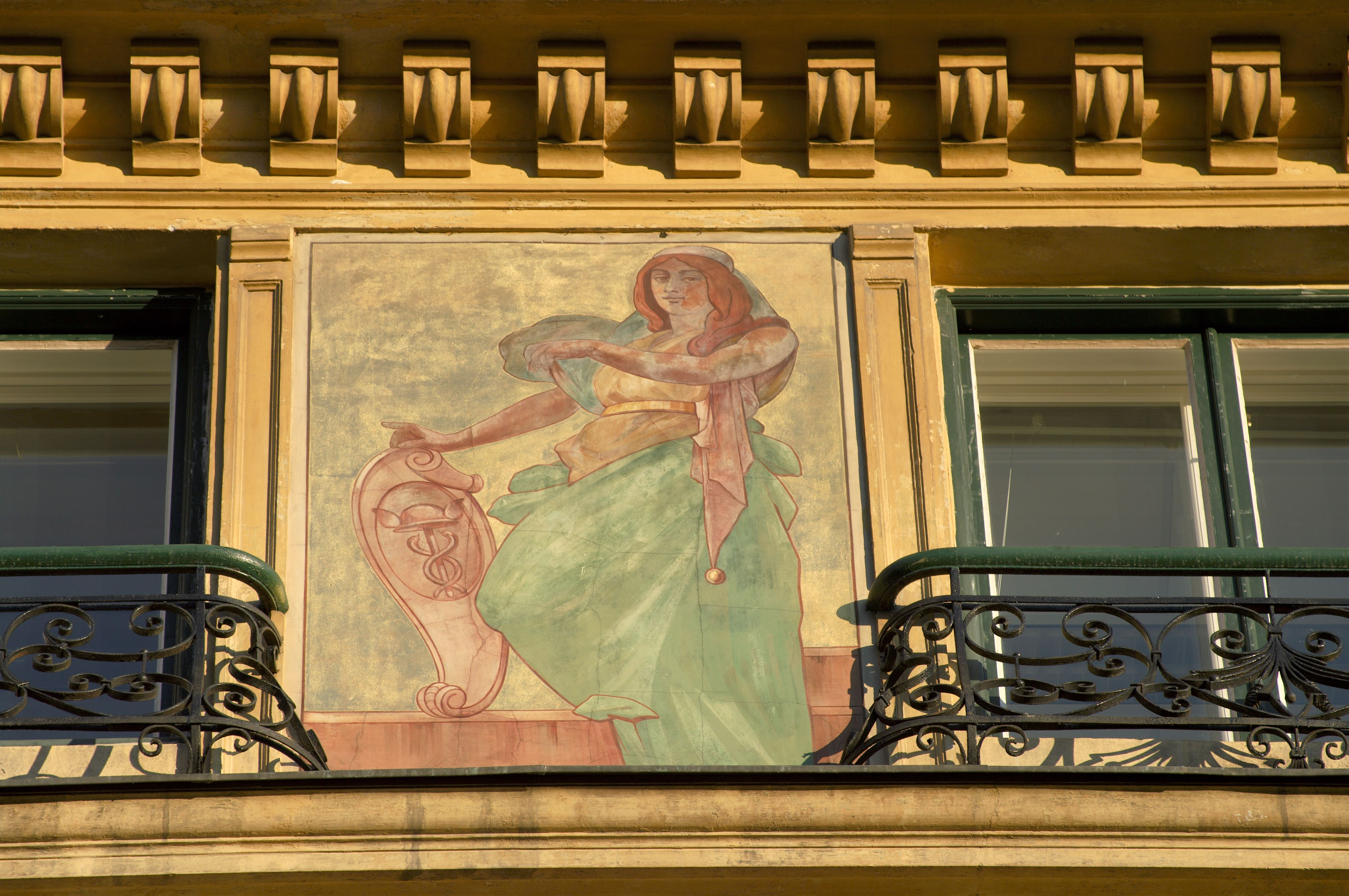 Skreddergården; forretningsgård i Akersgata i Oslo med fasademalerier i de øvre etasjene.